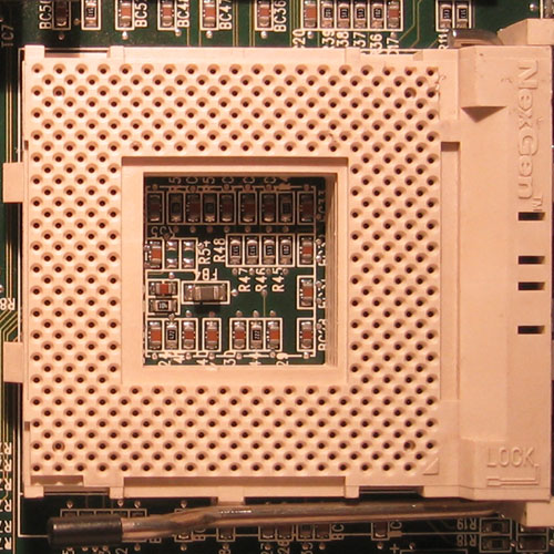 Сокет 463